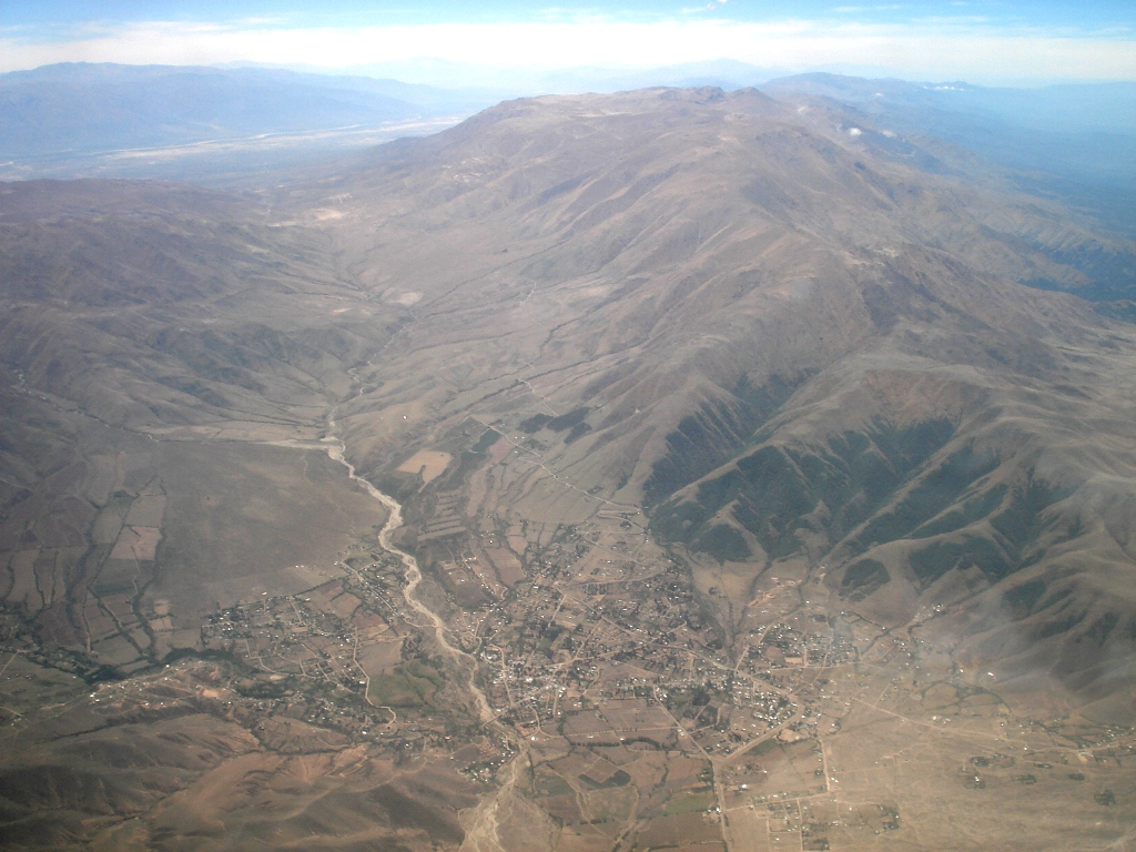 Vista aérea de Tafí del Valle, al pie del Cerro El Negrito.